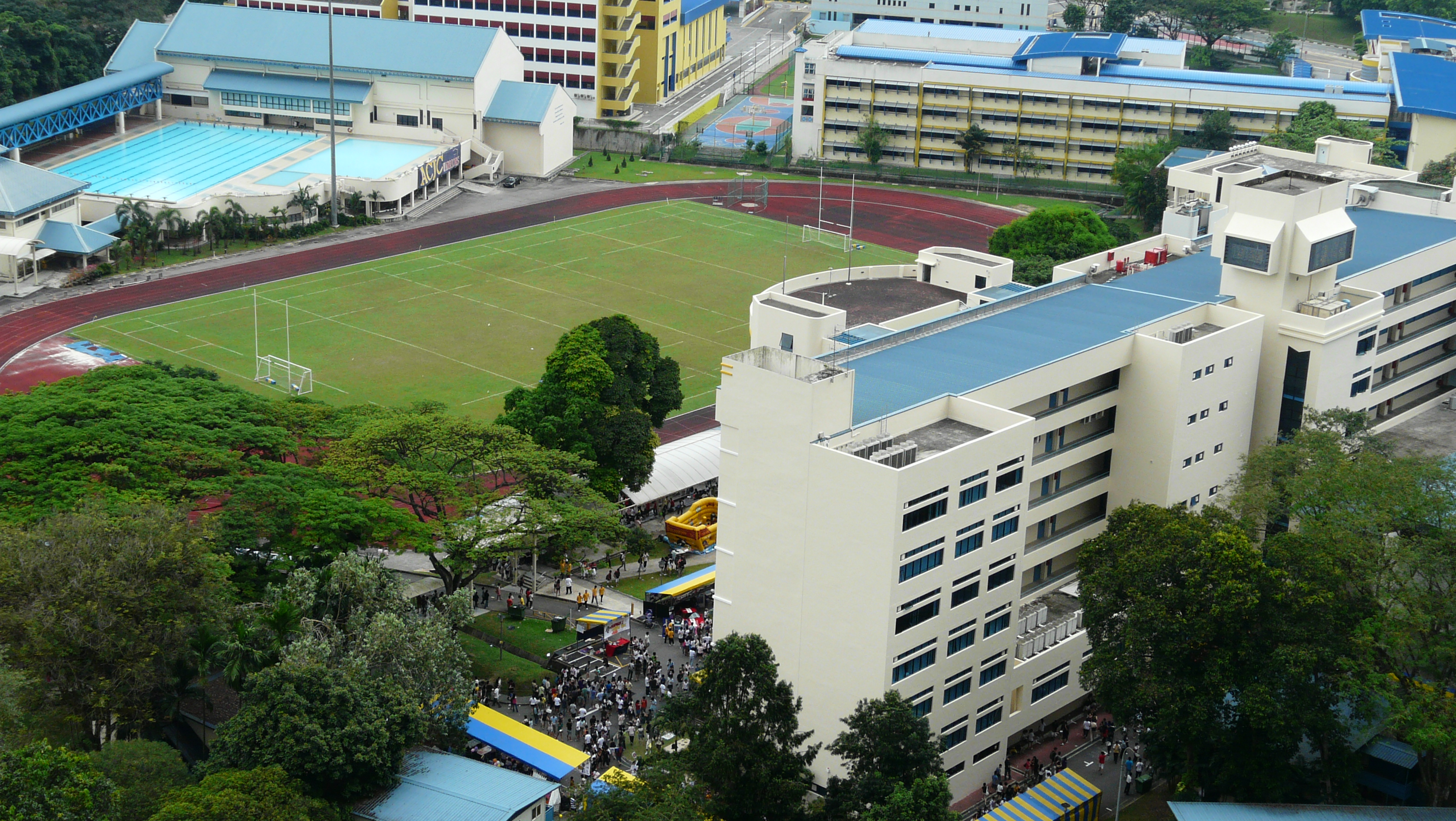 ACJC